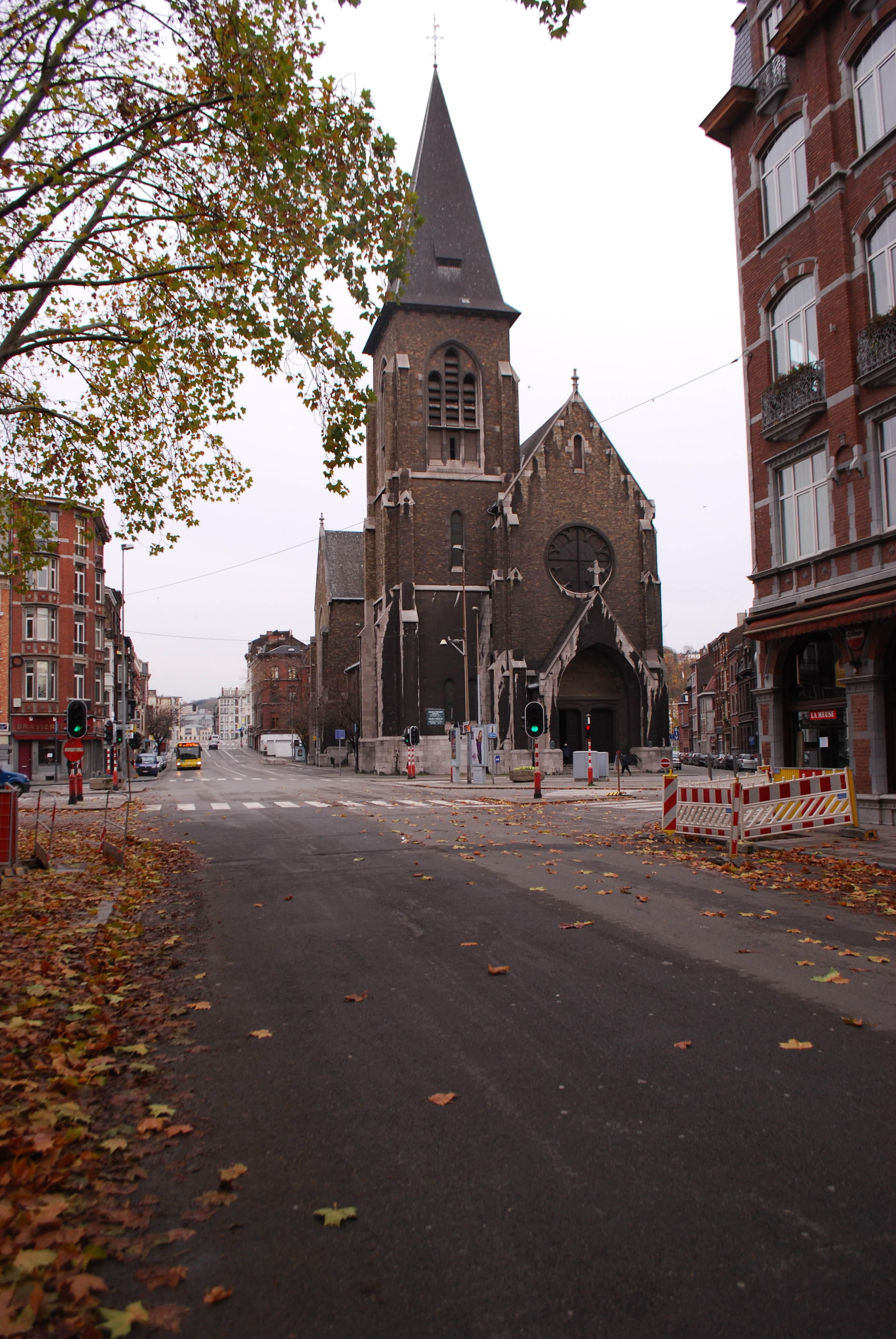 L'église Saint-Pholien à Liège, au carrefour du boulevard de l'Est, de la rue Saint-Pholien, du boulevard de la Constitution, et de la rue Ernest de Bavière.